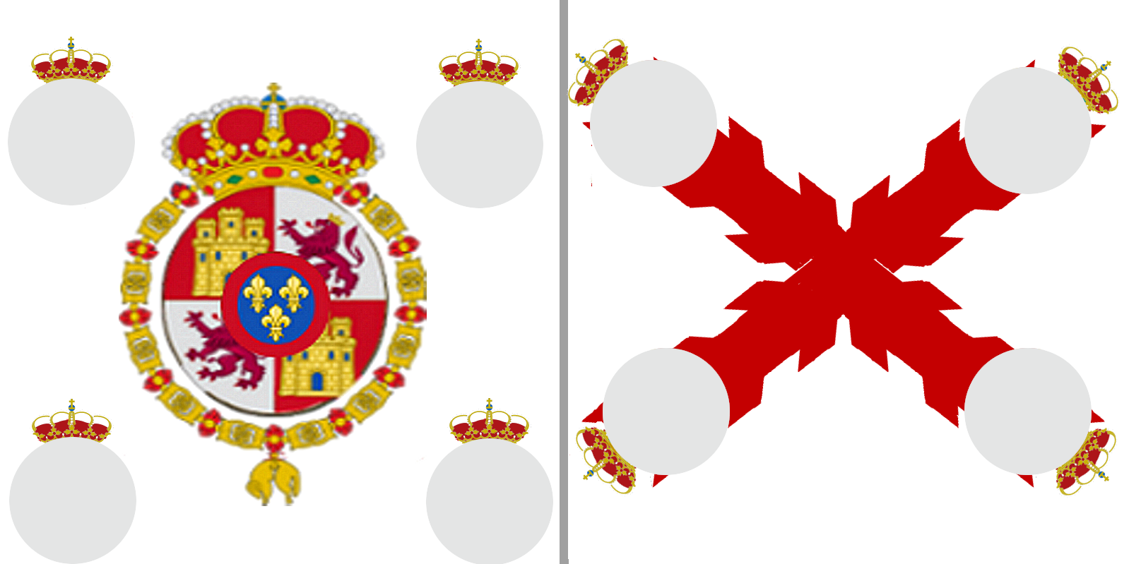 Regimientos de España 1808-1826